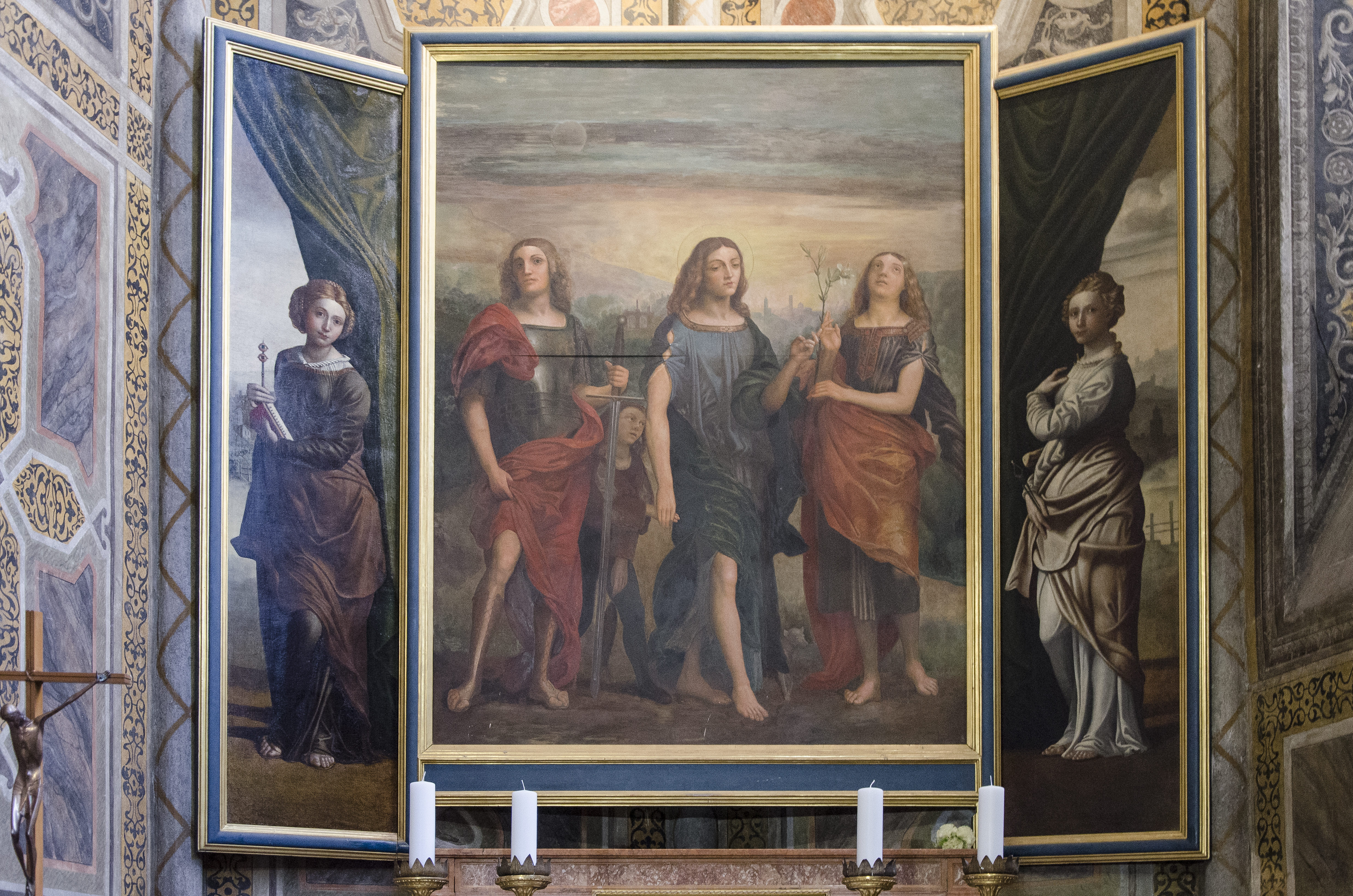 Chiesa di Sant'Eufemia - cappella Spolverini Dal Verme